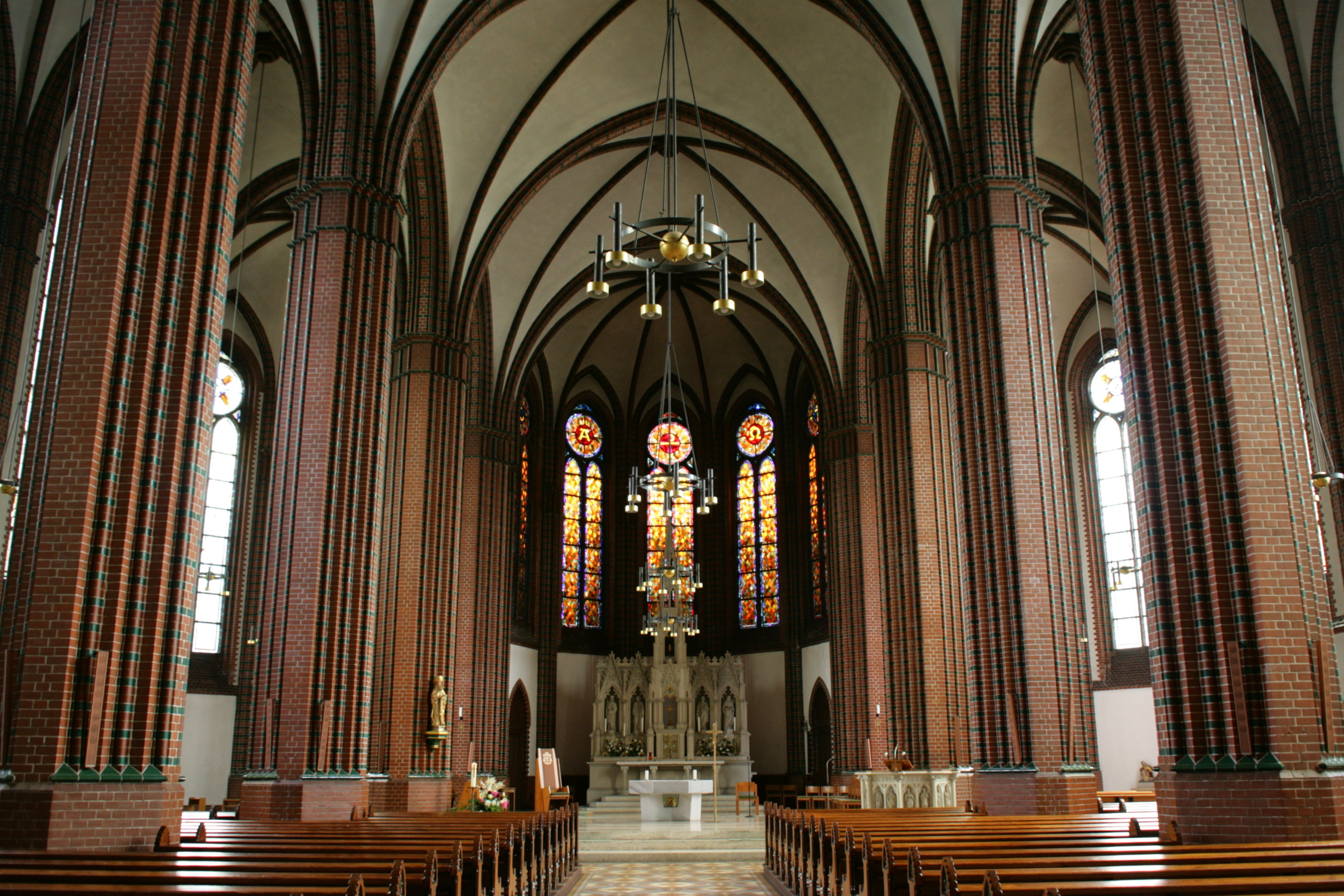 Jakobuskathedrale, An der Jakobuskirche in Görlitz